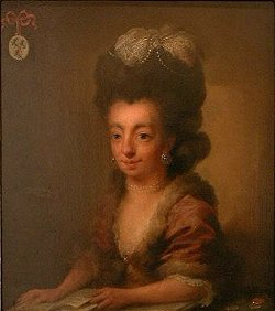 Portret van Juliana Cornelia de Lannoy, oliverfschilderij van Niels Rode, 1778 (Noordbrabants Museum, ’s-Hertogenbosch); in bruikleen gegeven aan Museum De Roos, in Geertruidenberg, het voormalige woonhuis van de geportretteerde.